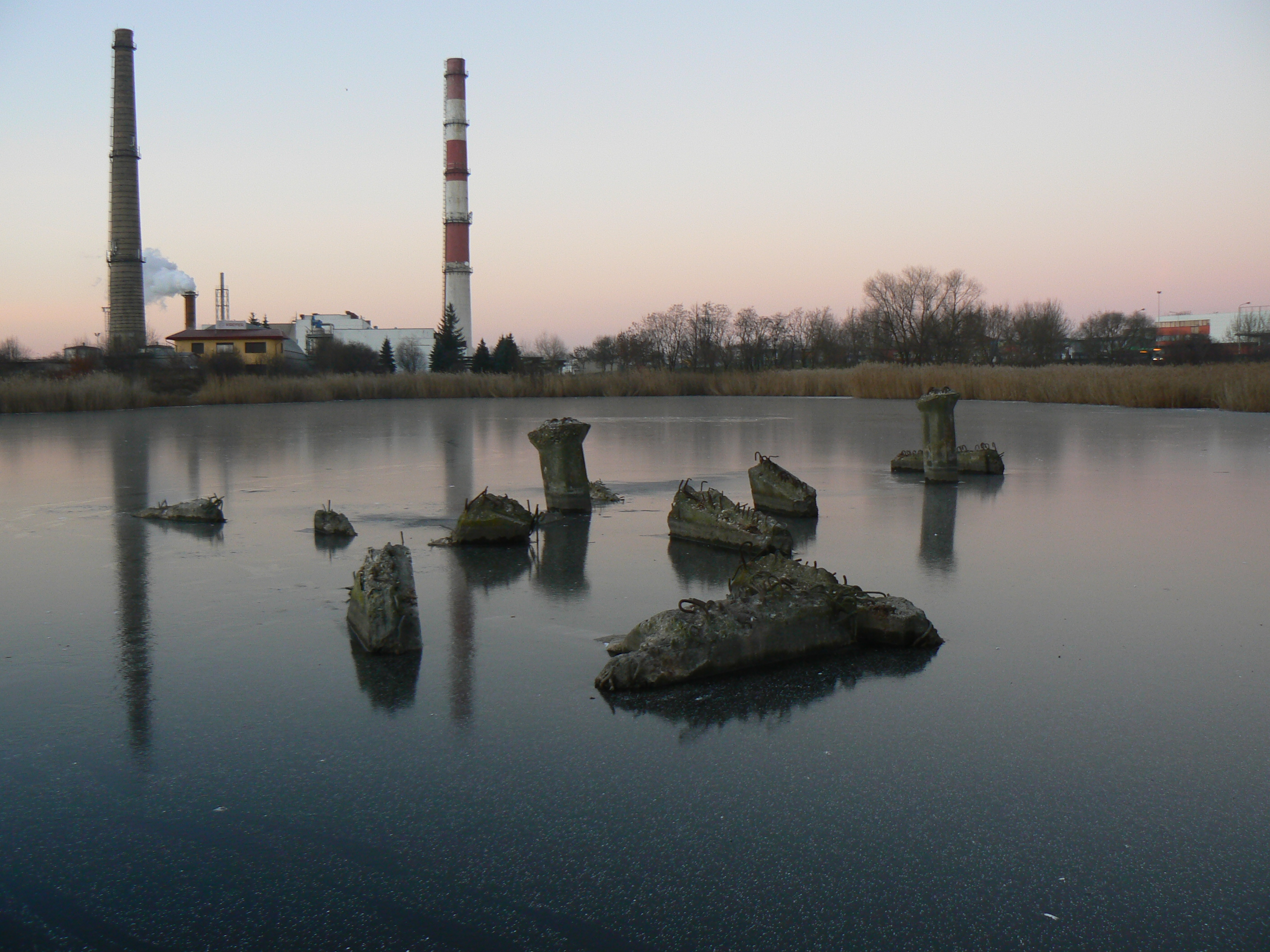 Věž kostela Nejsvětější Panenky Marie, královny míru v Klaipėdě, stržená tanky v roce 1961 (v noci) a "utopená" v jezeře "Bajkaliukas".